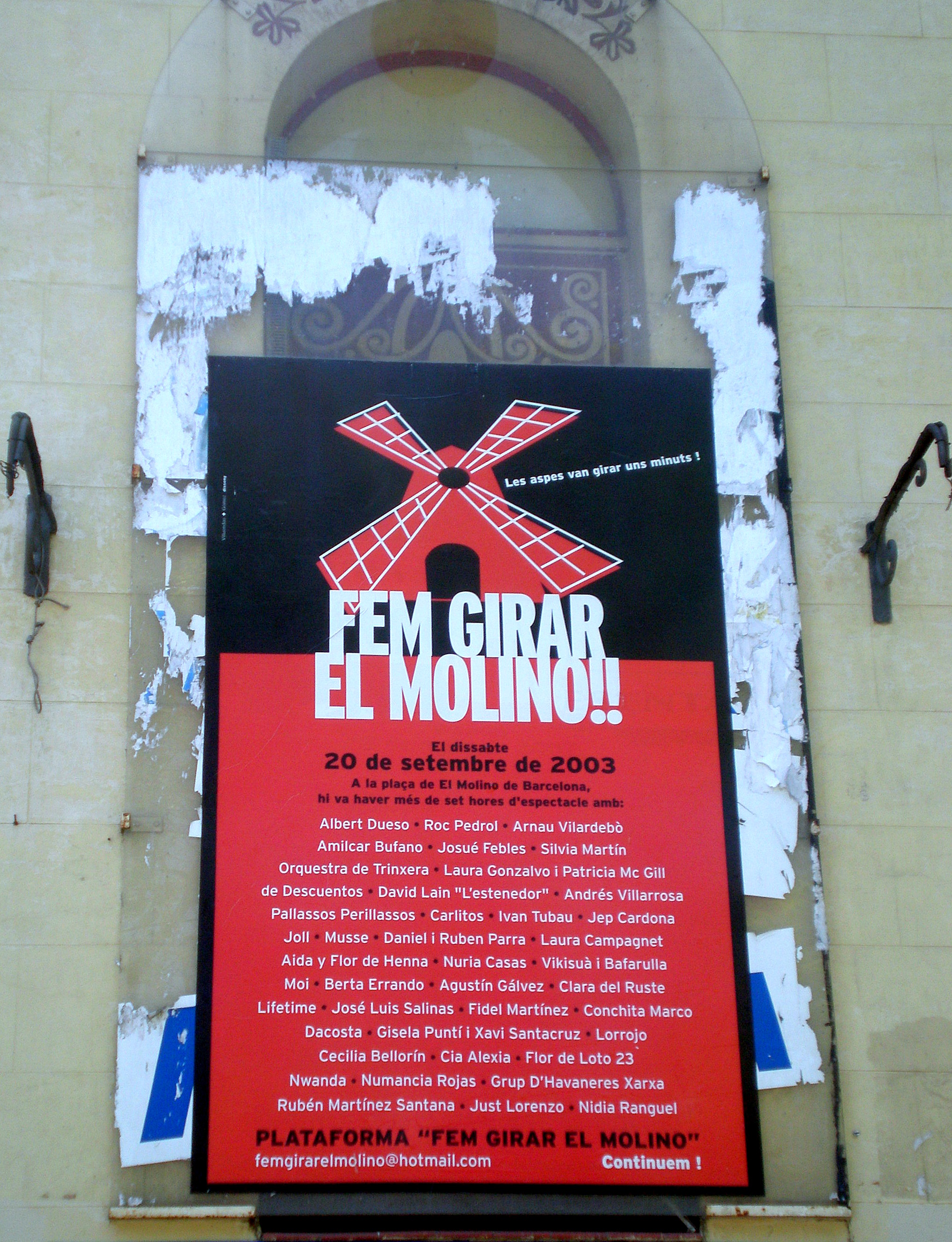 Fem girar el Molino ? Anuncia un acte del 20 de setembre de 2003. Foto feta el 2008 al carrer Vila i Vilà xamfrà Roser.